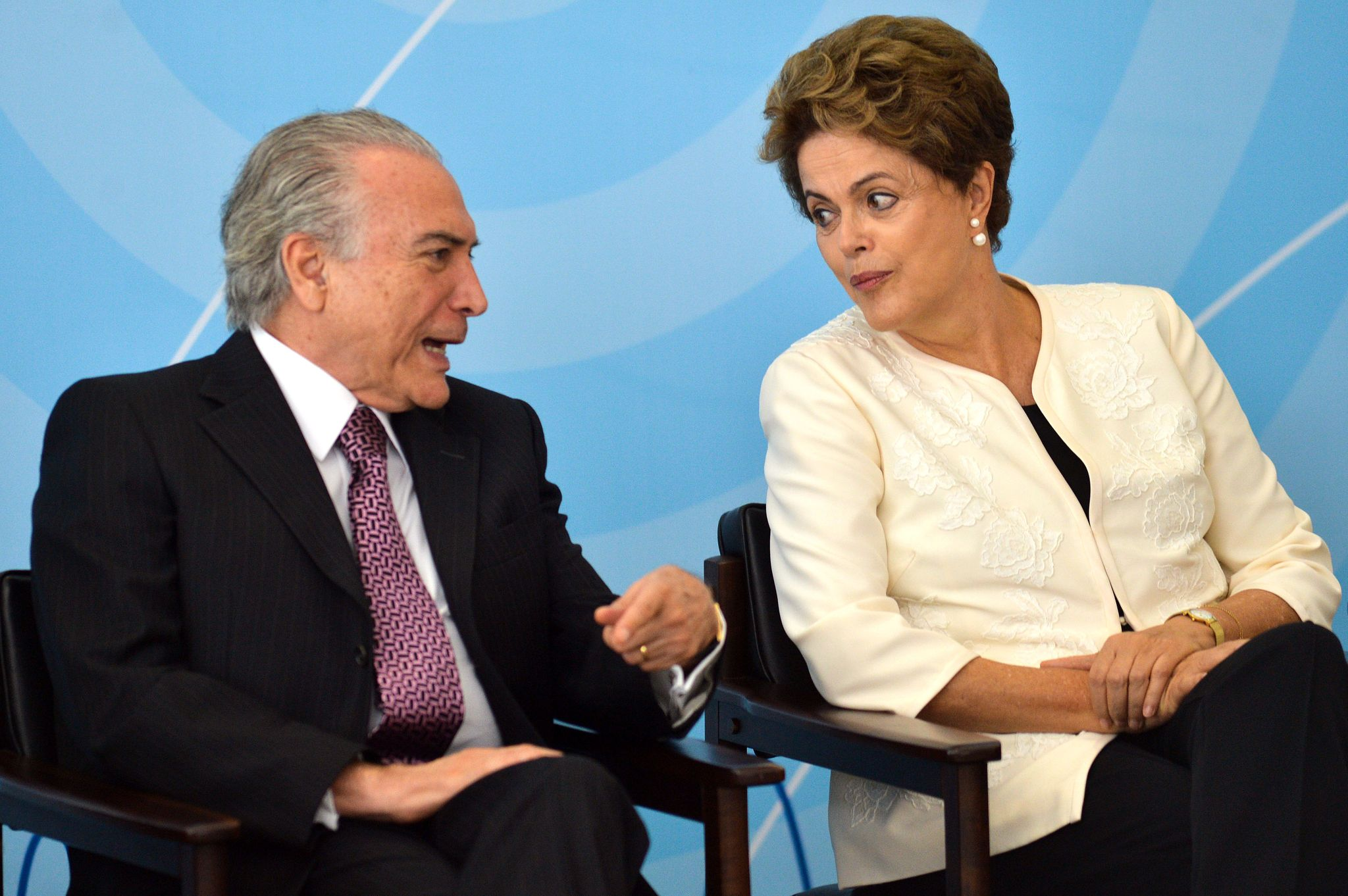 Dilma Rousseff e Michel Temer em 24 de novembro de 2015.